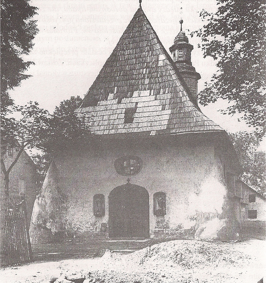 Kościół św. Krzyża w Żywcu, ok. 1908 r.